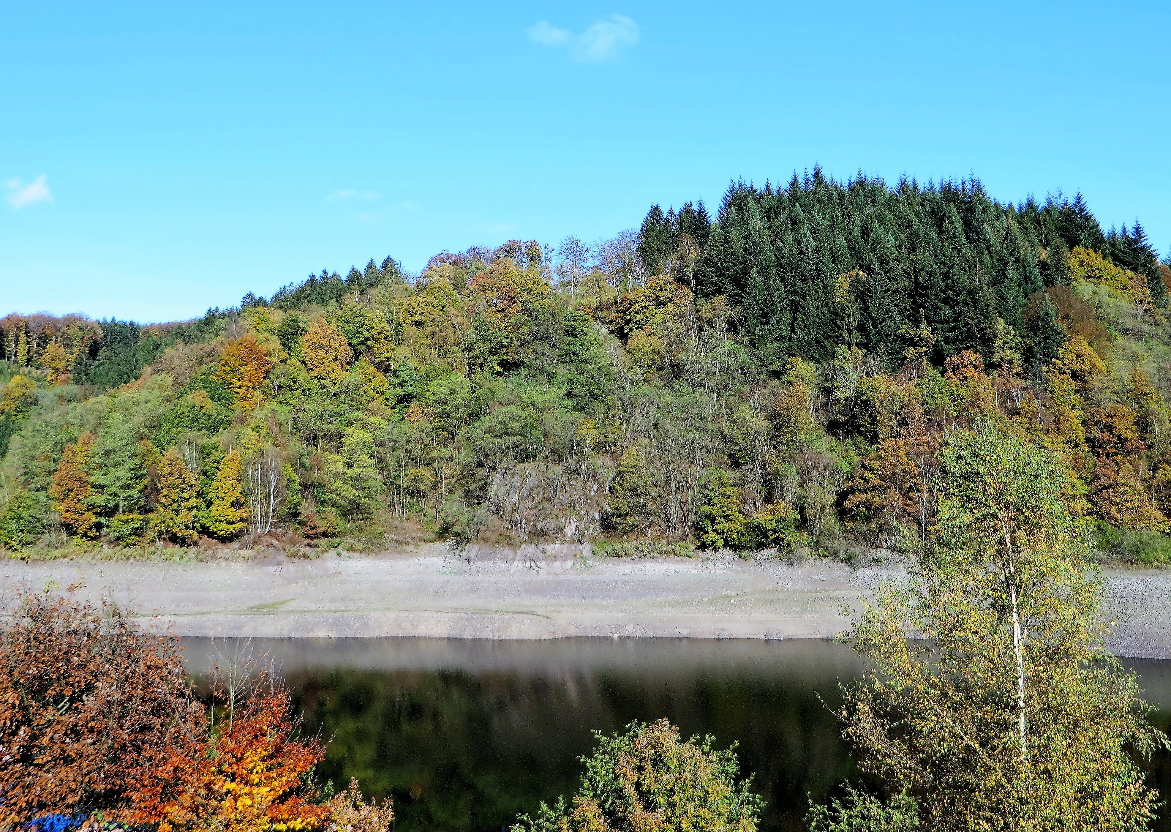 Geschützter Landschaftsbestandteil „Steinbruch Hasper Talsperre“ in Hagen. Der ehemalige Steinbruch (Bildmitte) in den Brandenberg-Schichten des Mitteldevon mit südexponierten Felswänden liegt am Nordufer der Hasper Talsperre.